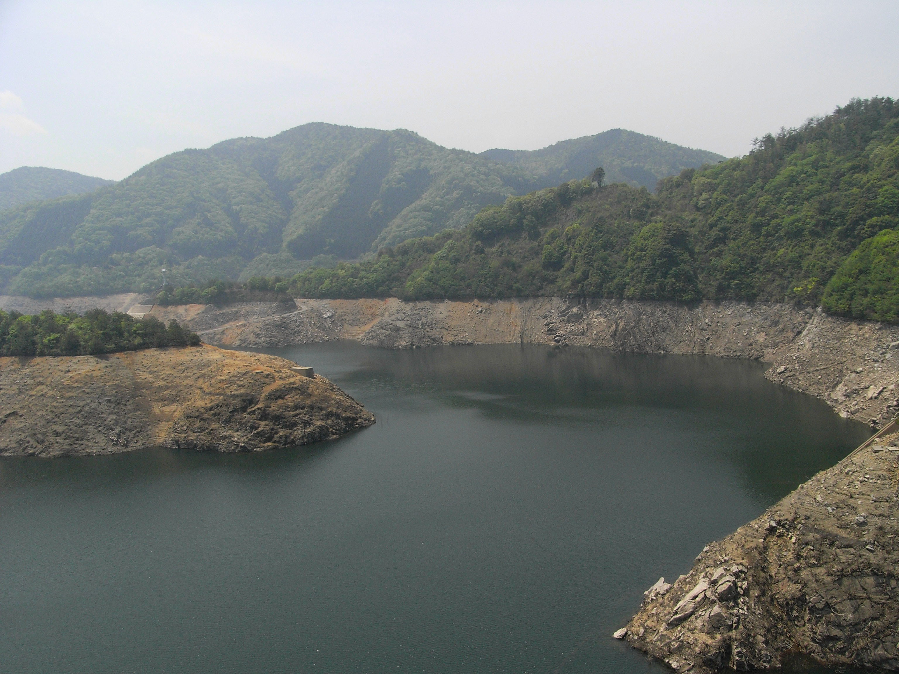 Lake